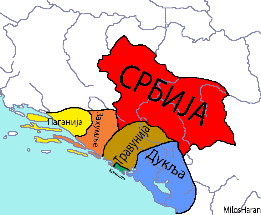 Srpske sklavnijie.